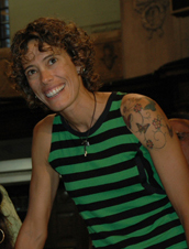 Atleta do vôlei de areia Adriana Behar homenageada na ALERJ